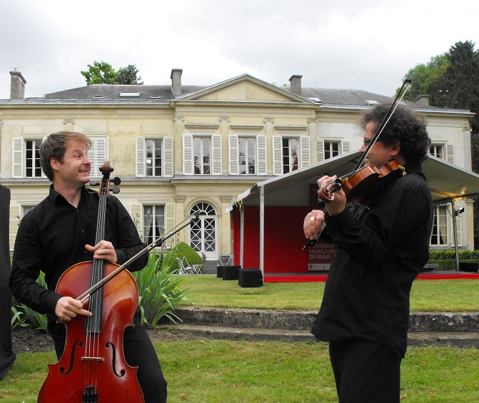 Quator Debussy (Christophe Collette/violon, Marc Vieillefon/violon, Vincent Depreck/alto, Fabrice Bihan, violoncelle). Concert du 22 Juin 2013 dans le parc du château de Saint Brice Courcelles (Marne) Oeuvres de Dvoràk, Samuel Barber, Marc Mellits, Astor Piazzolla).